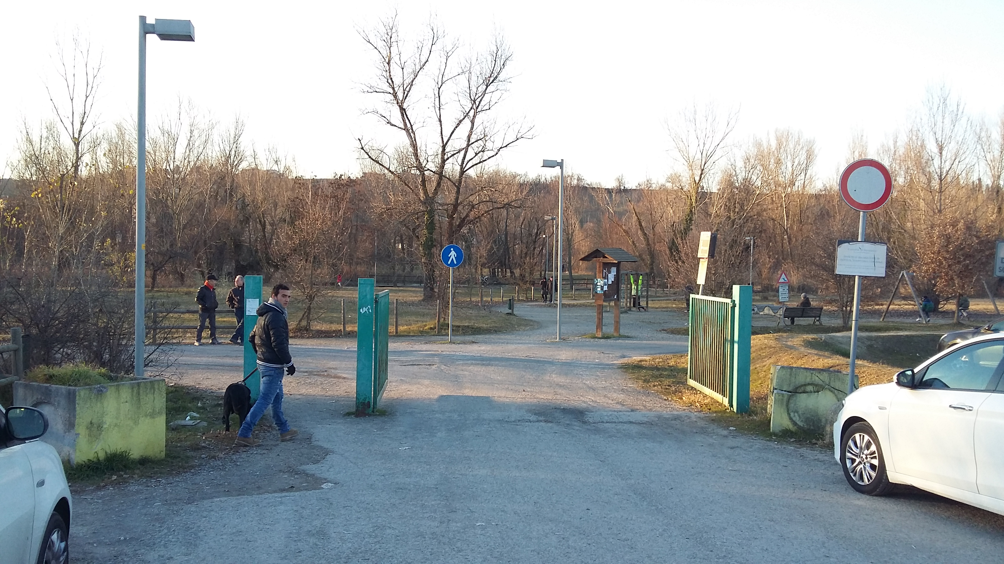 Percorso Natura del Secchia, Sassuolo (MO)